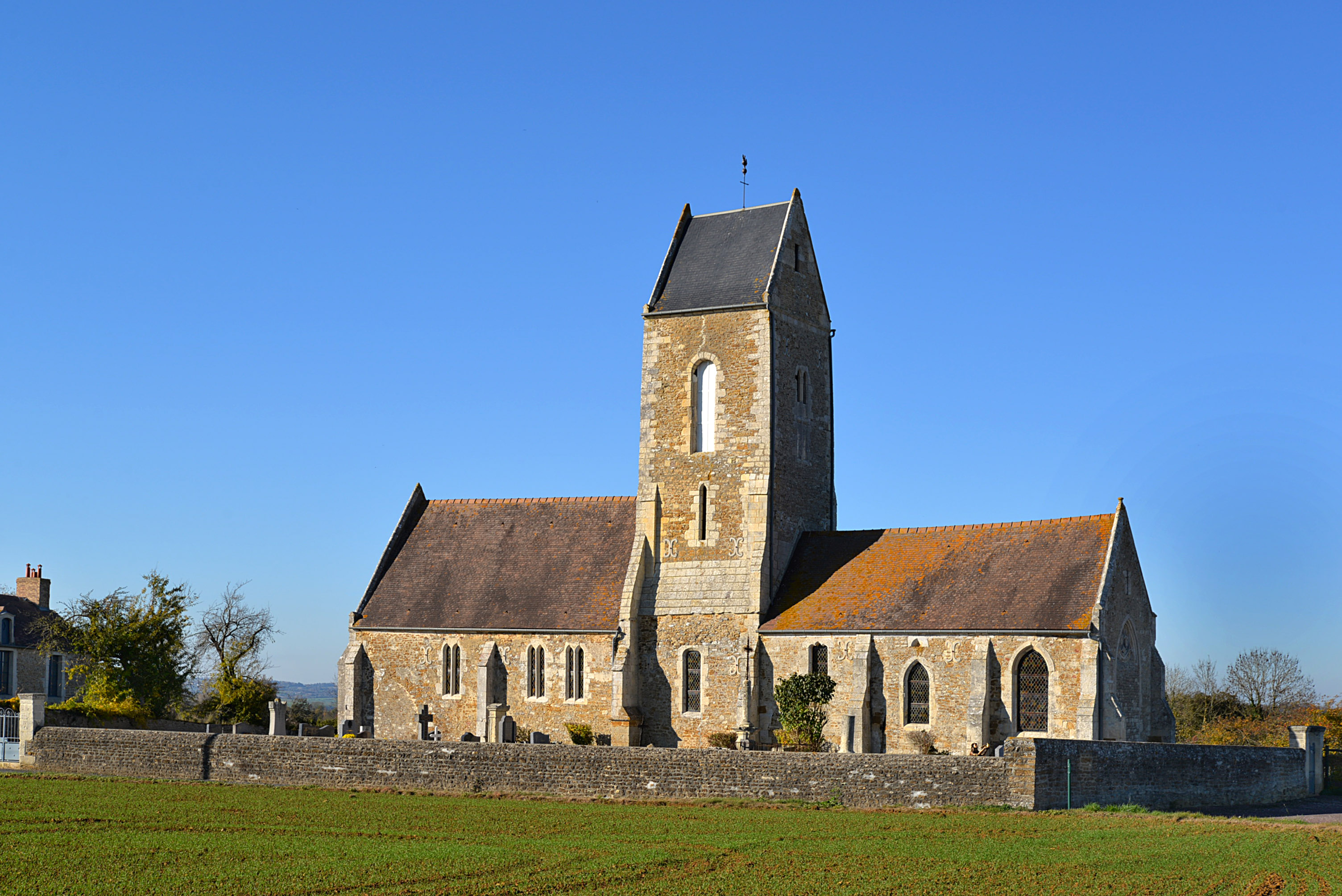 Placy (Calvados)